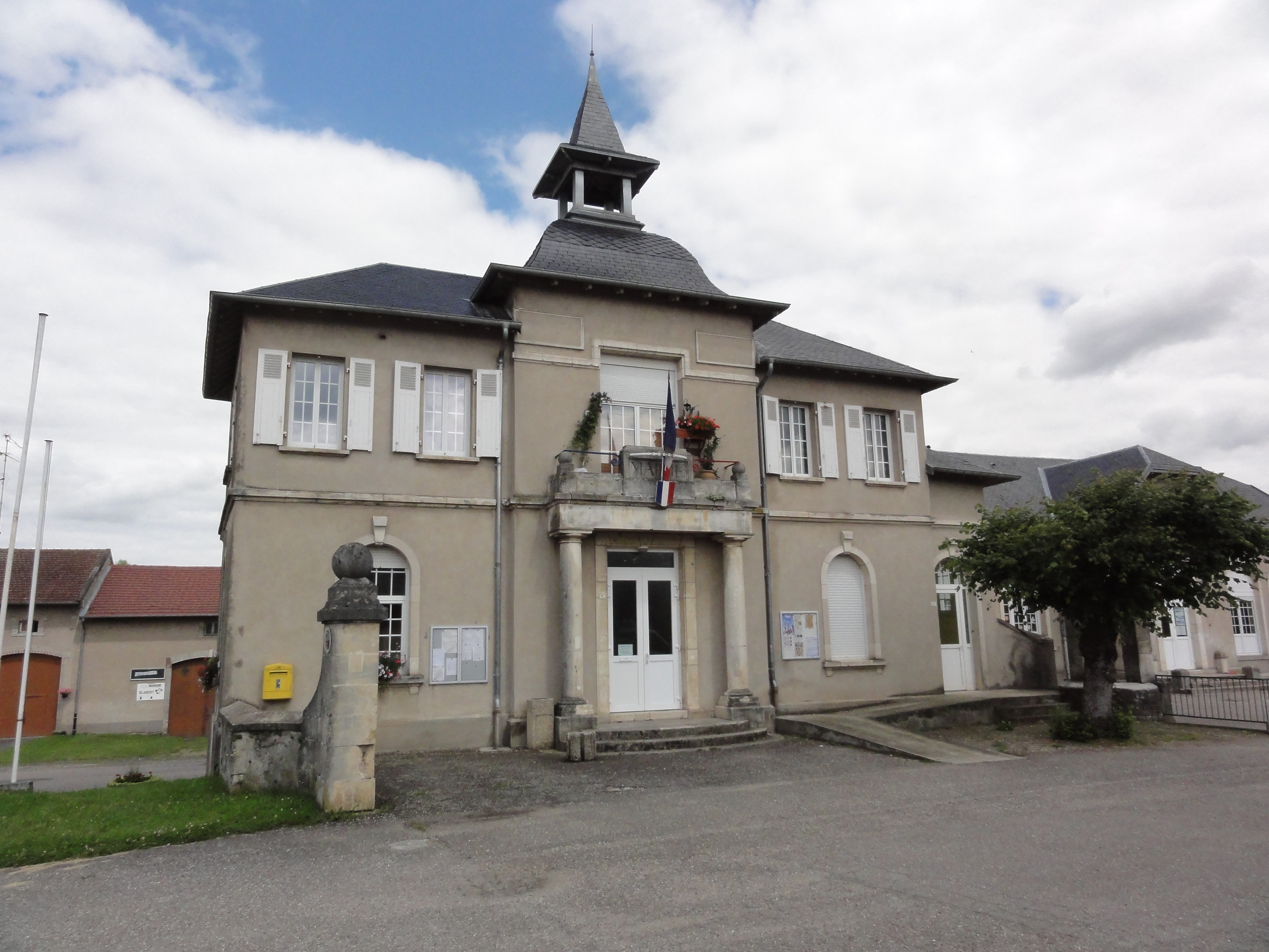 Leintrey (M-et-M) mairie